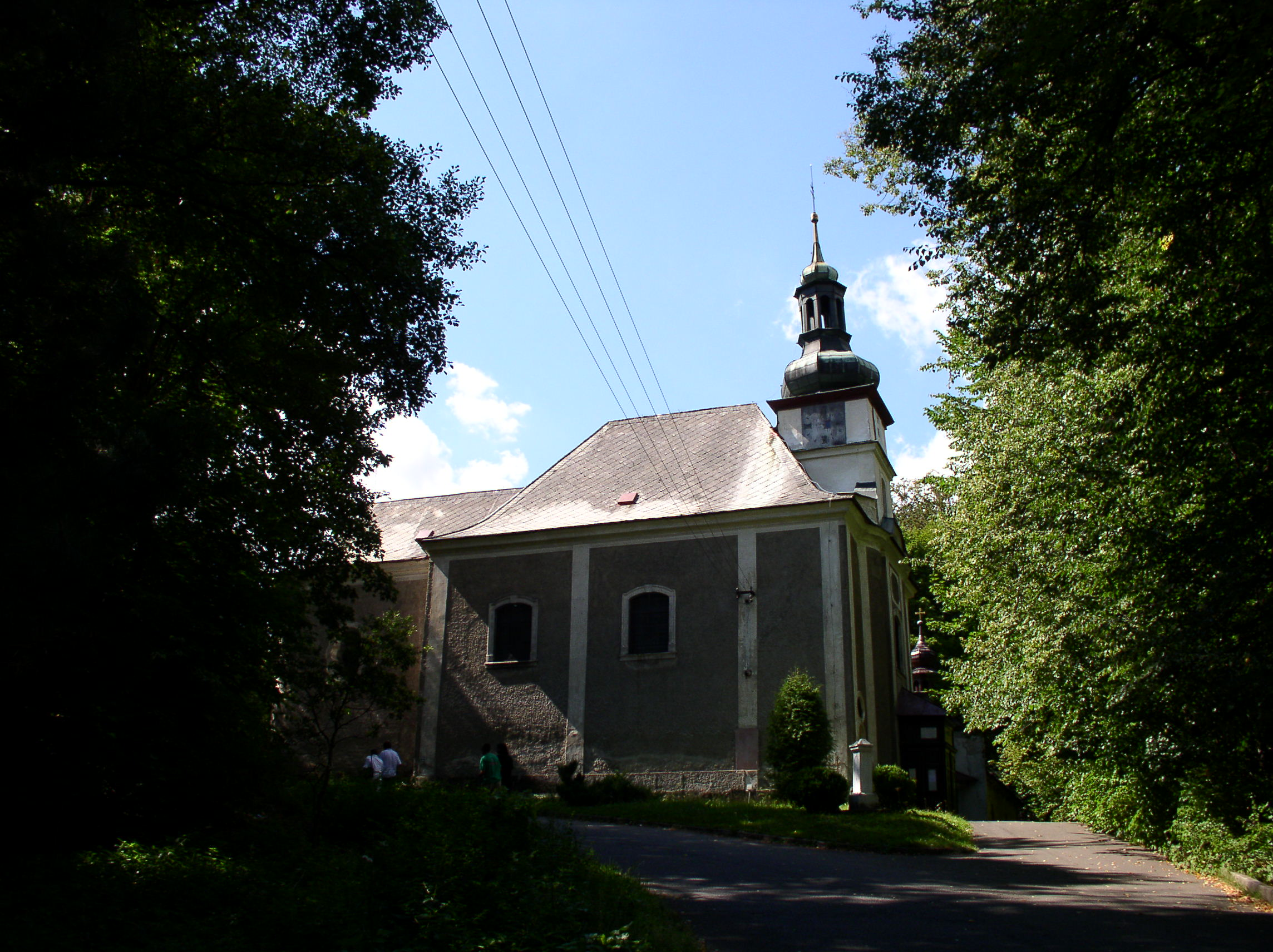 Kostel Panny Marie Pomocné v Teplicích nad Metují